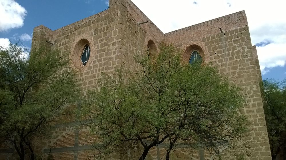 Costado de Capilla de la exhacienda de Loretito, localizada en San Francisco de los Romo.